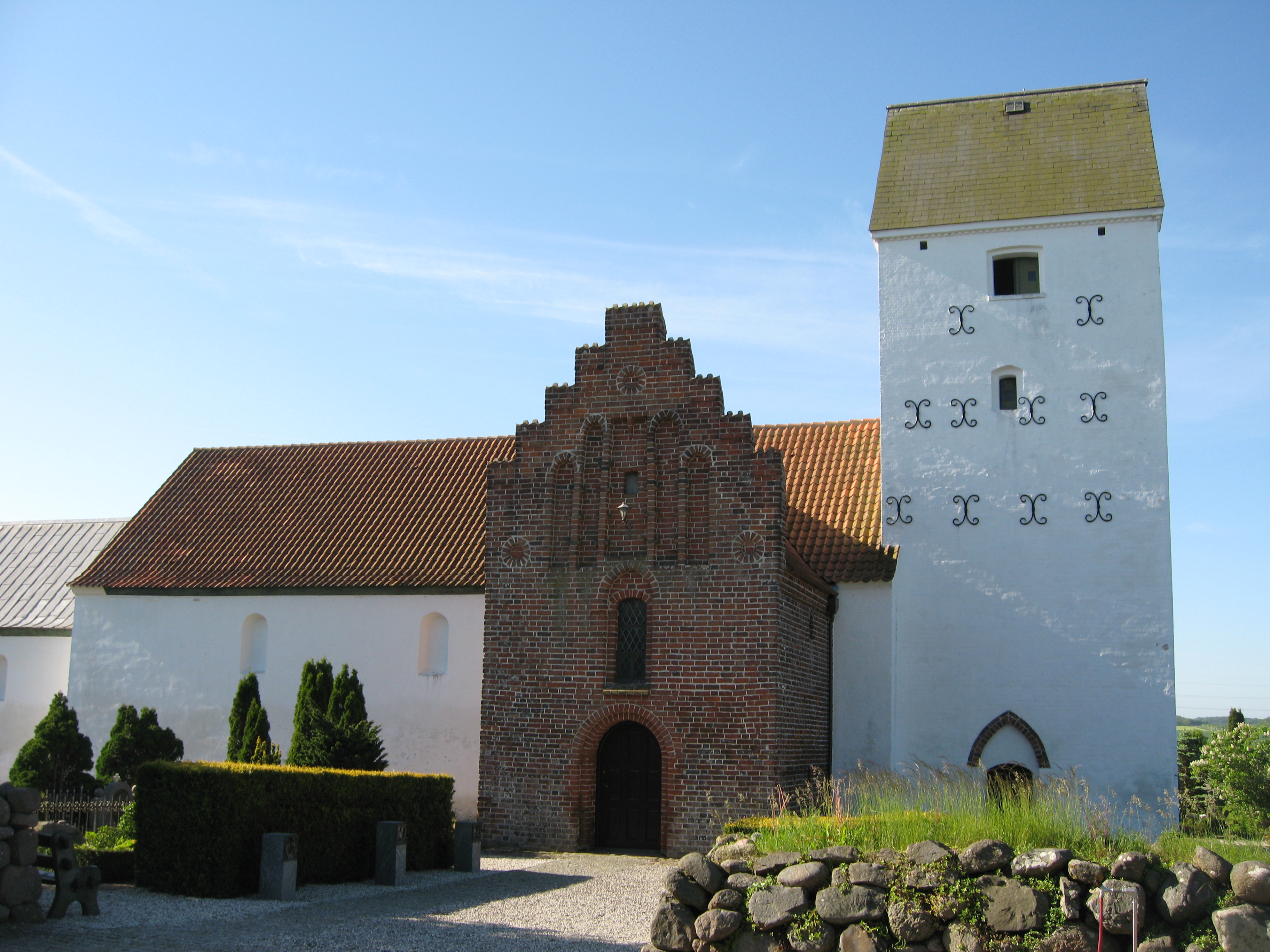 Ørridslev Kirke, Horsens Kommune, Region Midtjylland